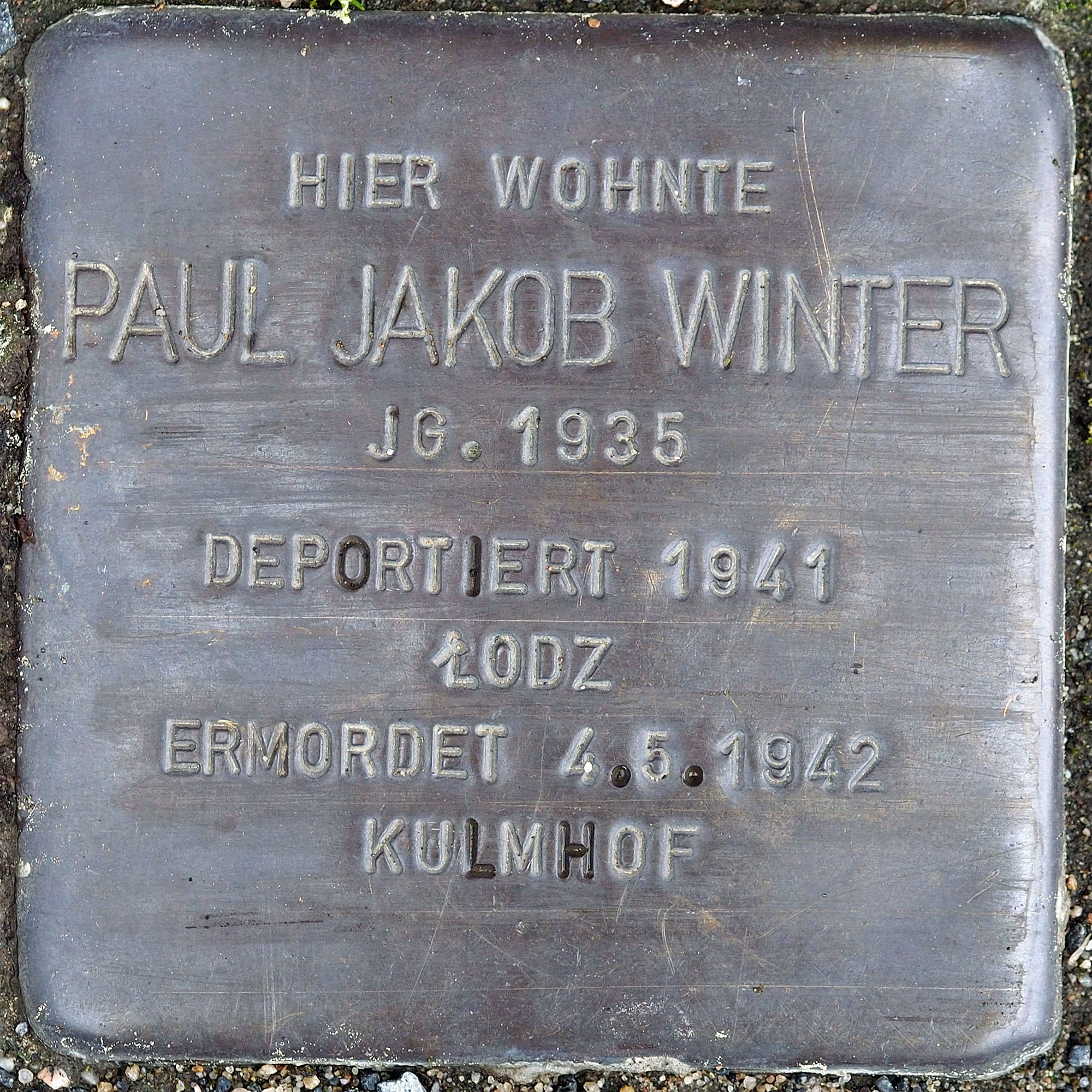 Stolpersteine Korschenbroich: Winter, Paul Jakob